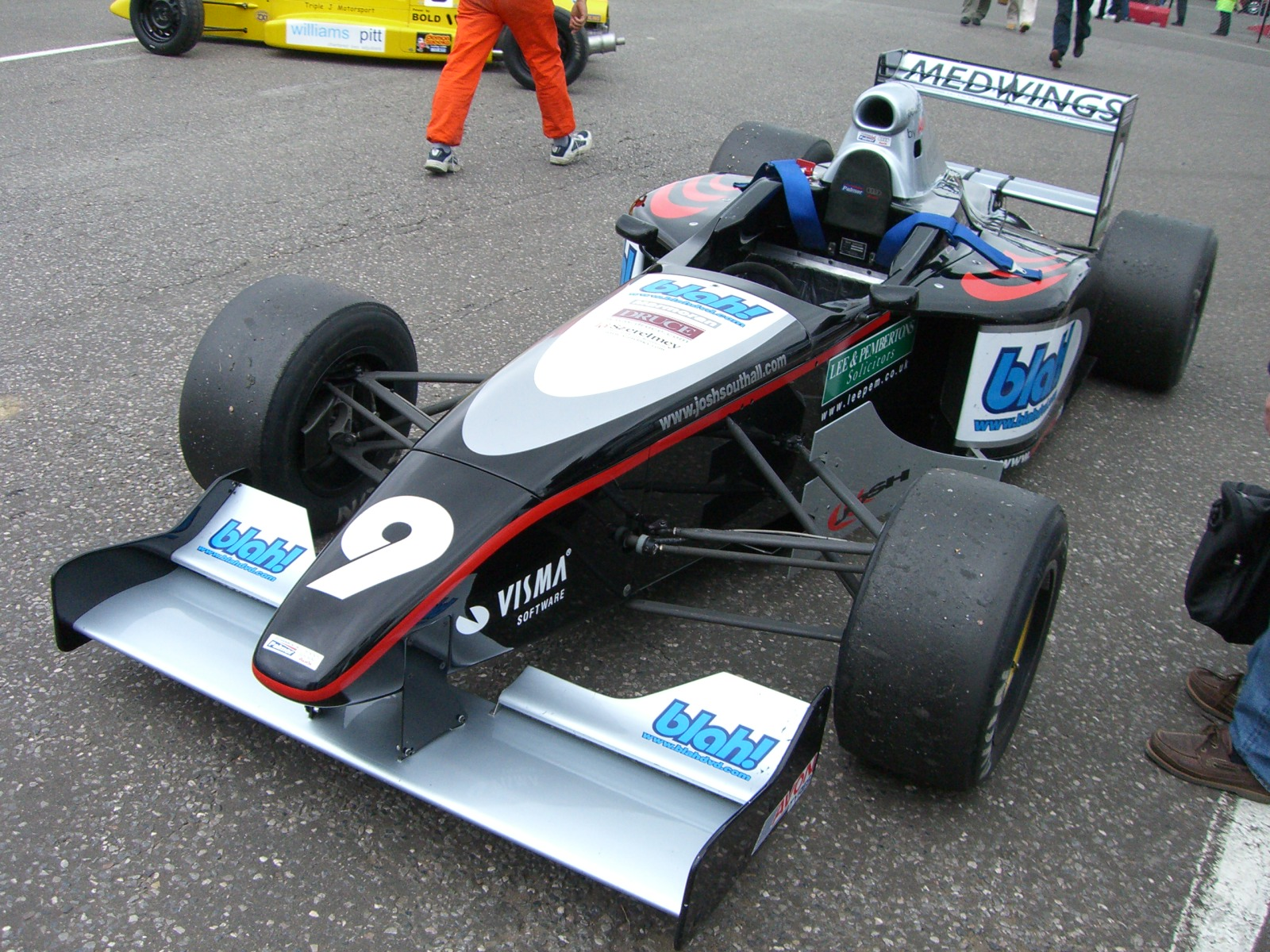 A Formula Palmer Audi single-seat race car